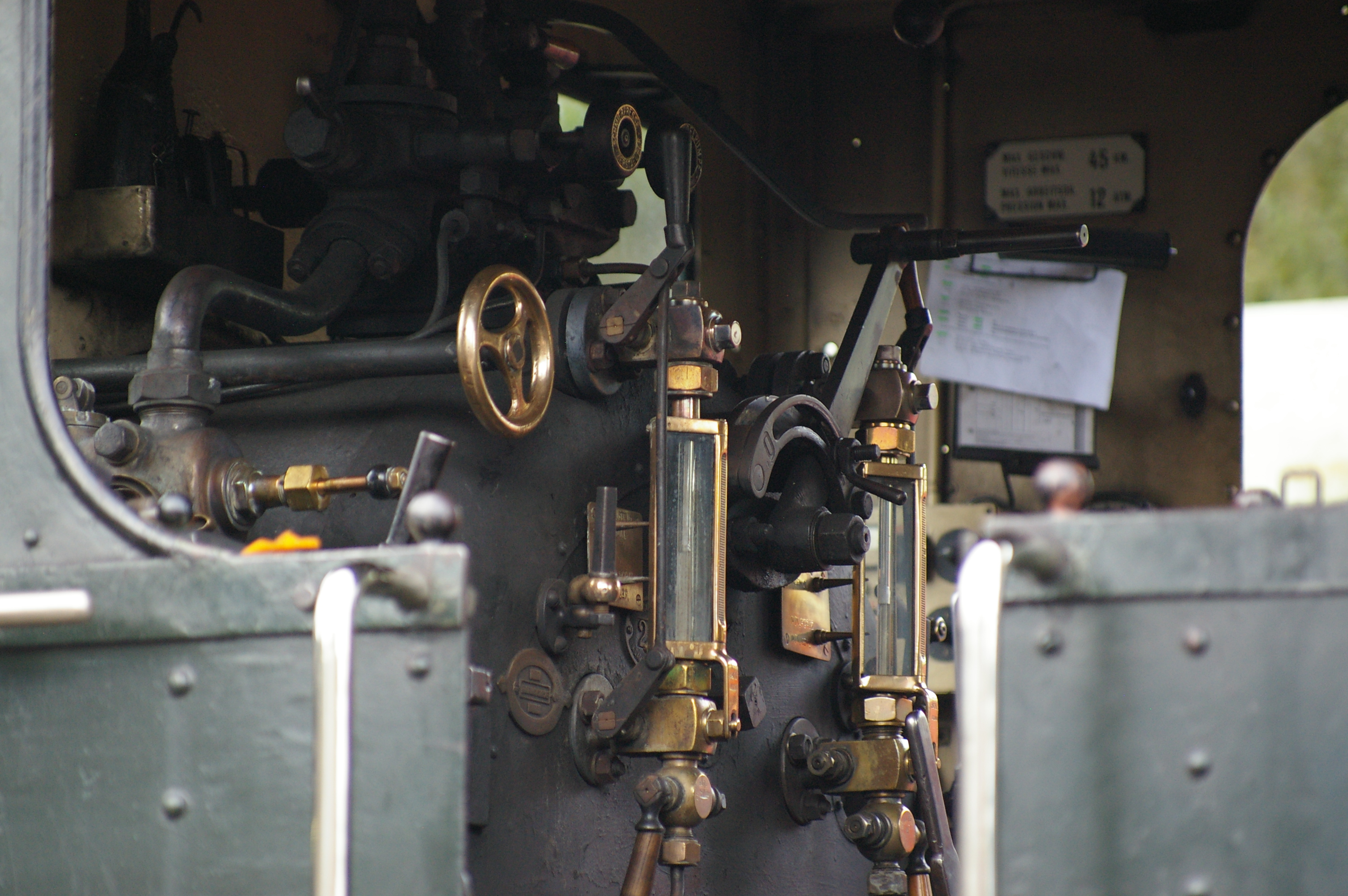 Blick in den Führerſtand der Dampflocomotive E 3/3 Nr. 10 des Dampfbahn-Vereins Zürcher Oberland im Bahnhofe von Bauma, gebaut 1907 inn der Schweizeriſchen Machines-Fabrique zů Winterthur für die Schweizeriſchen Bundesbahnen (Betribsnummer 8476), 1962—2001 Werckslocomotive der Chemiſchen Fabrique zů Ütikon.